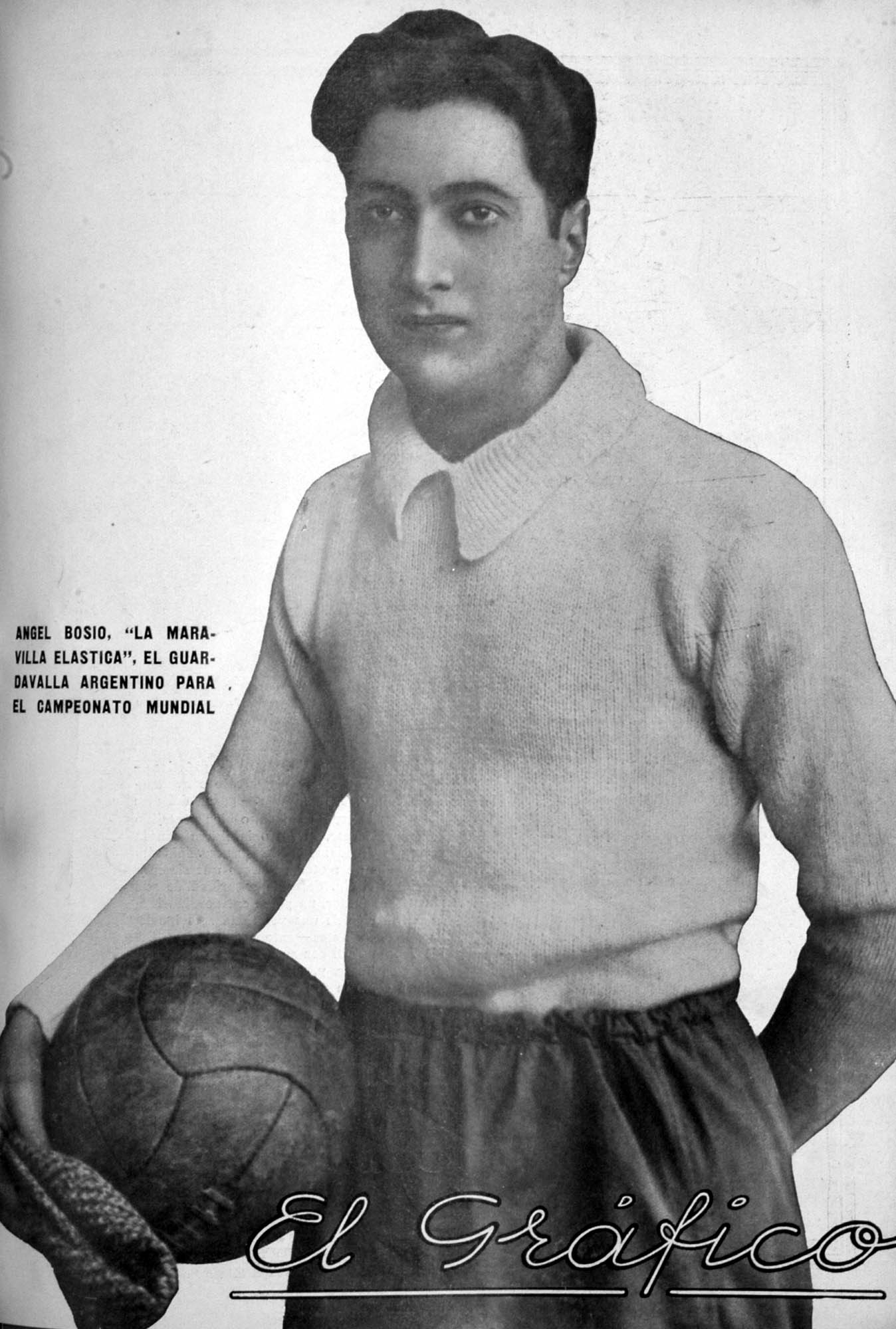 El Grafico del 12 de Julio de 1930. Edicion 574